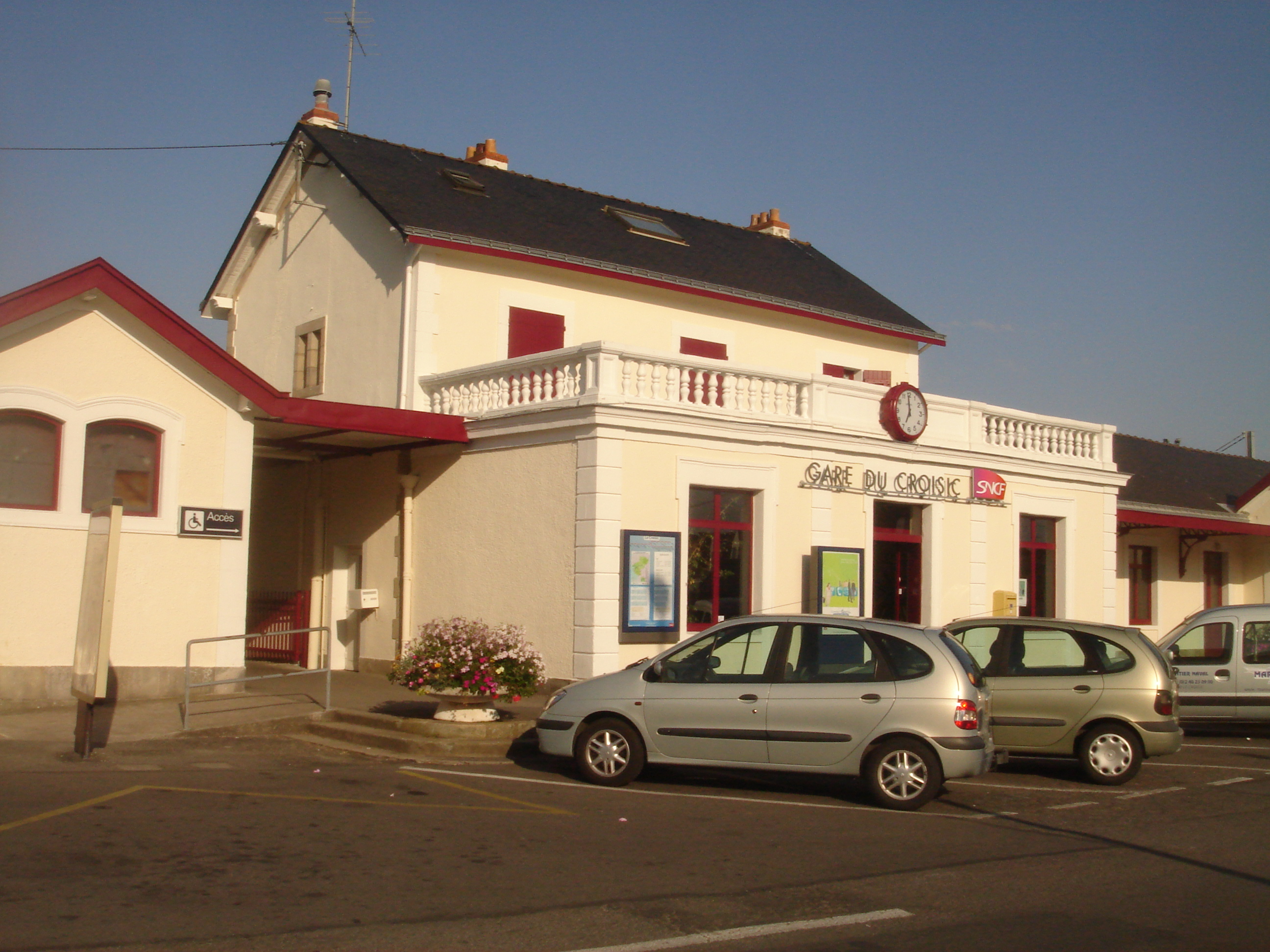 Gare du Croisic, Le Croisic, Loire-Atlantique, Pays de Loire, France